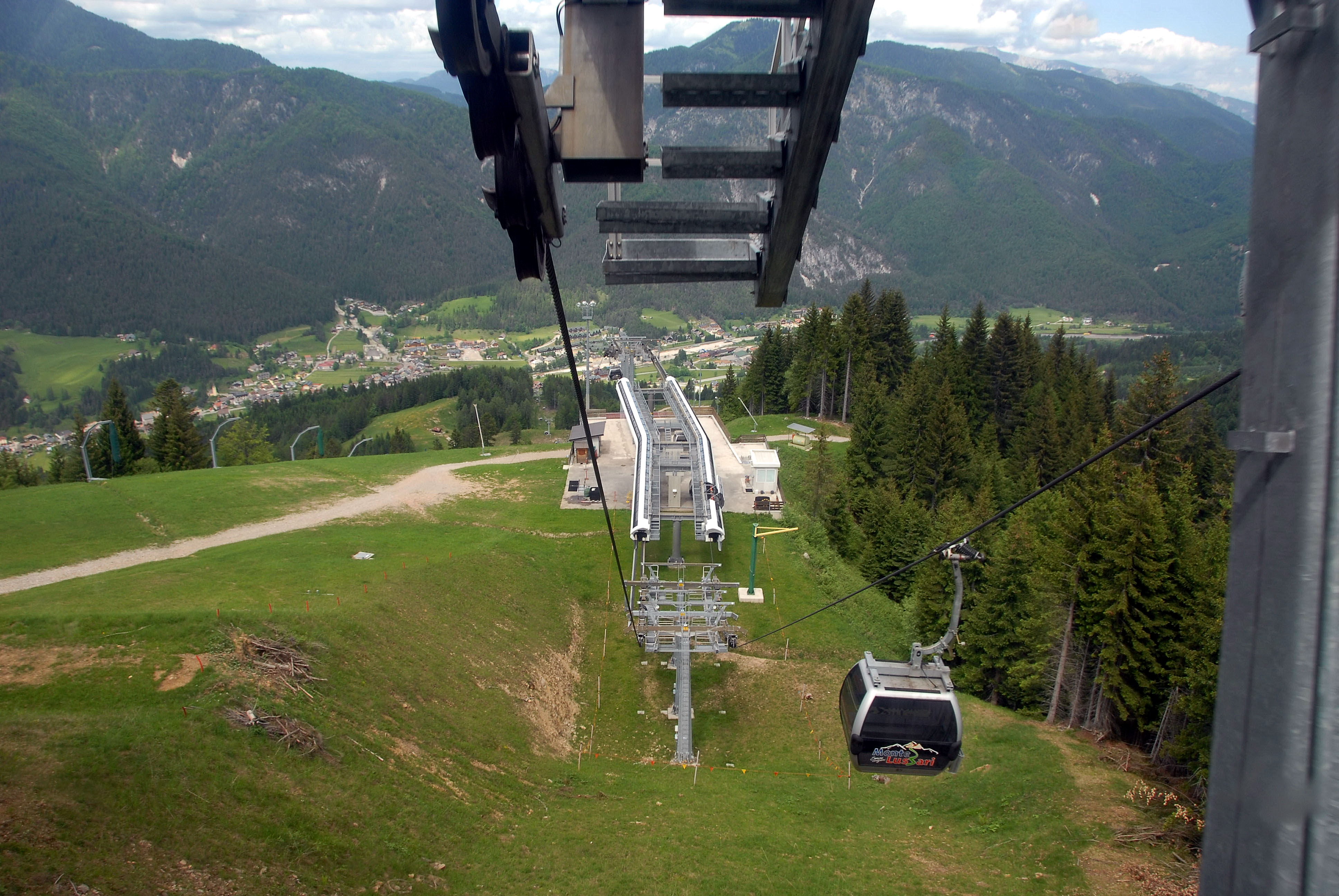 Cable car to Monte Lussari, situated in the locality Camporosso, community Tarvisio, province of Udine, region Friuli-Venezia Giulia, Italy